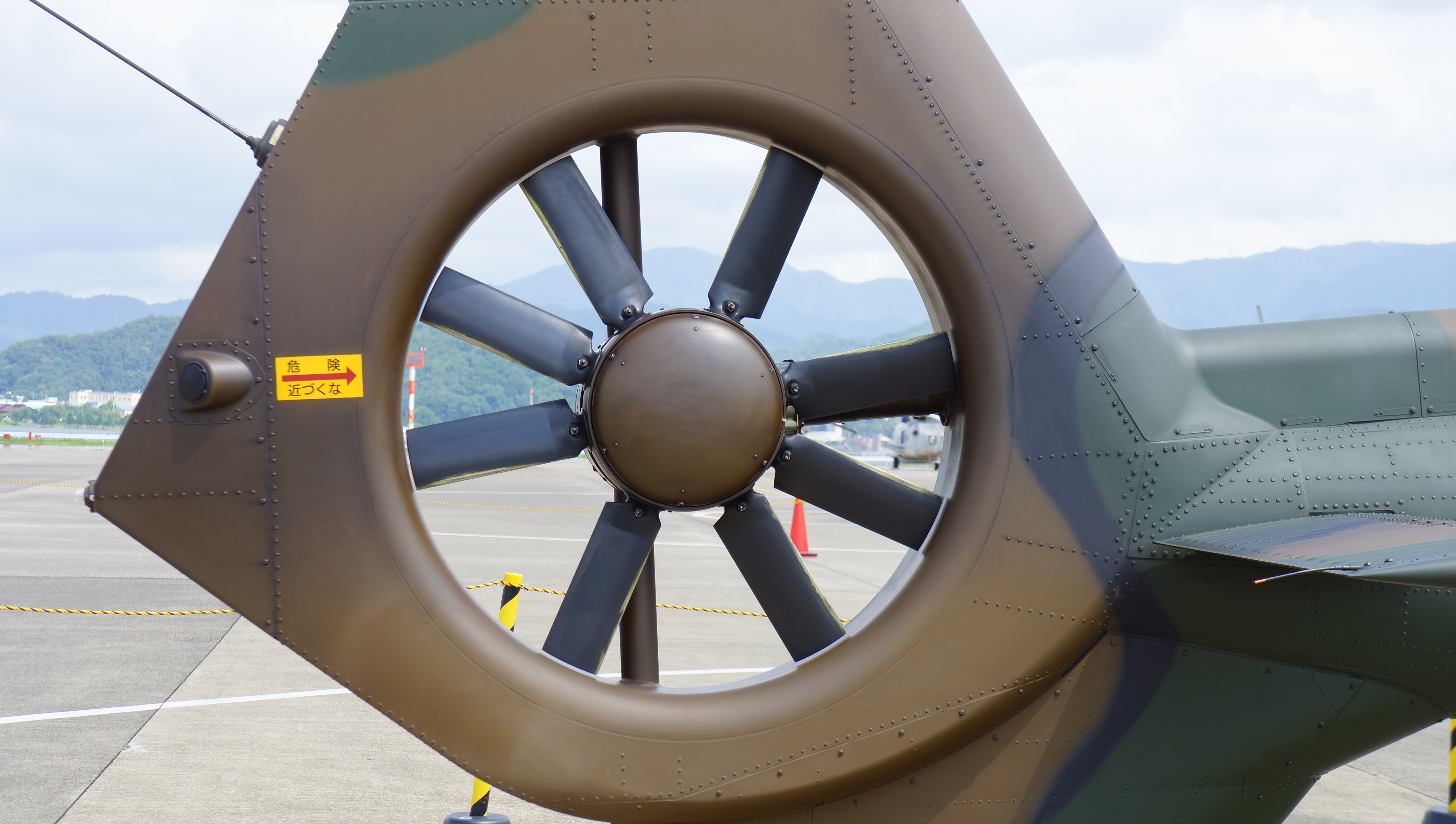 陸上自衛隊 OH-1観測ヘリコプター（32634号機） フェネストロンローター。 14年7月27日 海上自衛隊舞鶴航空基地にて。